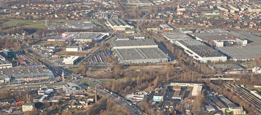 Zdjęcie lotnicze południowej części Komorowic, dzielnicy Bielska-Białej.Opis (od góry, od lewej): zabudowa jednorodzinna Komorowic Śląskich rzeka Biała kościół św. Jana Chrzciciela stadion BBTS Ceramed Komorowice (dawna nazwa klubu Podbeskidzie) wielkopłytowe osiedle mieszkaniowe (os. Komorowickie) Castorama Tesco Fiat Auto Poland Metalplast ul. Warszawska Fiat Auto Poland PKP Bielsko-Biała Północ Fiat Auto Poland CH Sarni Stok Rondo im. NSZZ Solidarność ul. Kwiatkowskiego salon samochodowy Volkswagena PKP Bielsko-Biała Zachód most kolejowy (linia nr 190) os. Grażyńskiego i ul. Warszawska